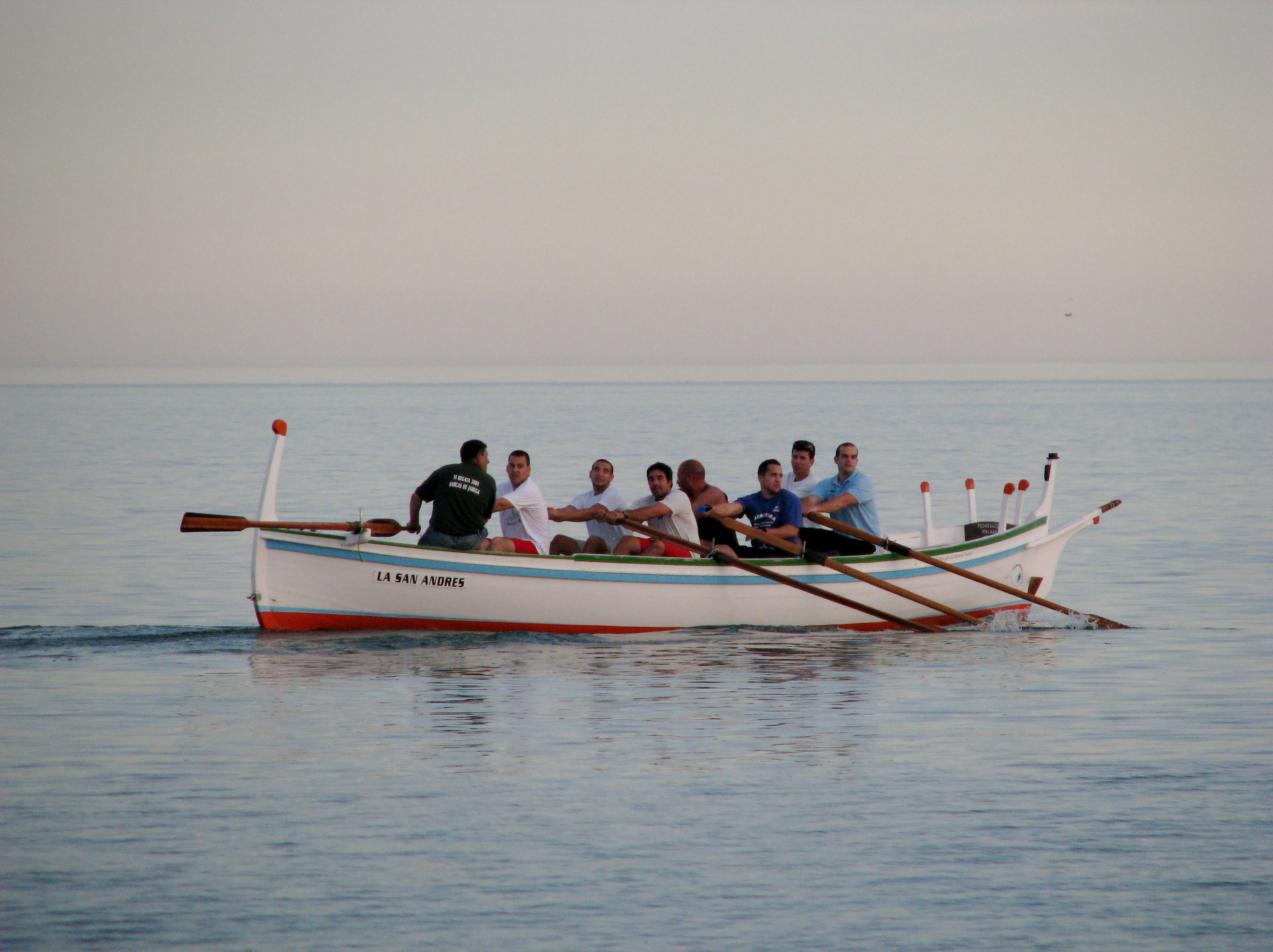 Jábega en Málaga, España